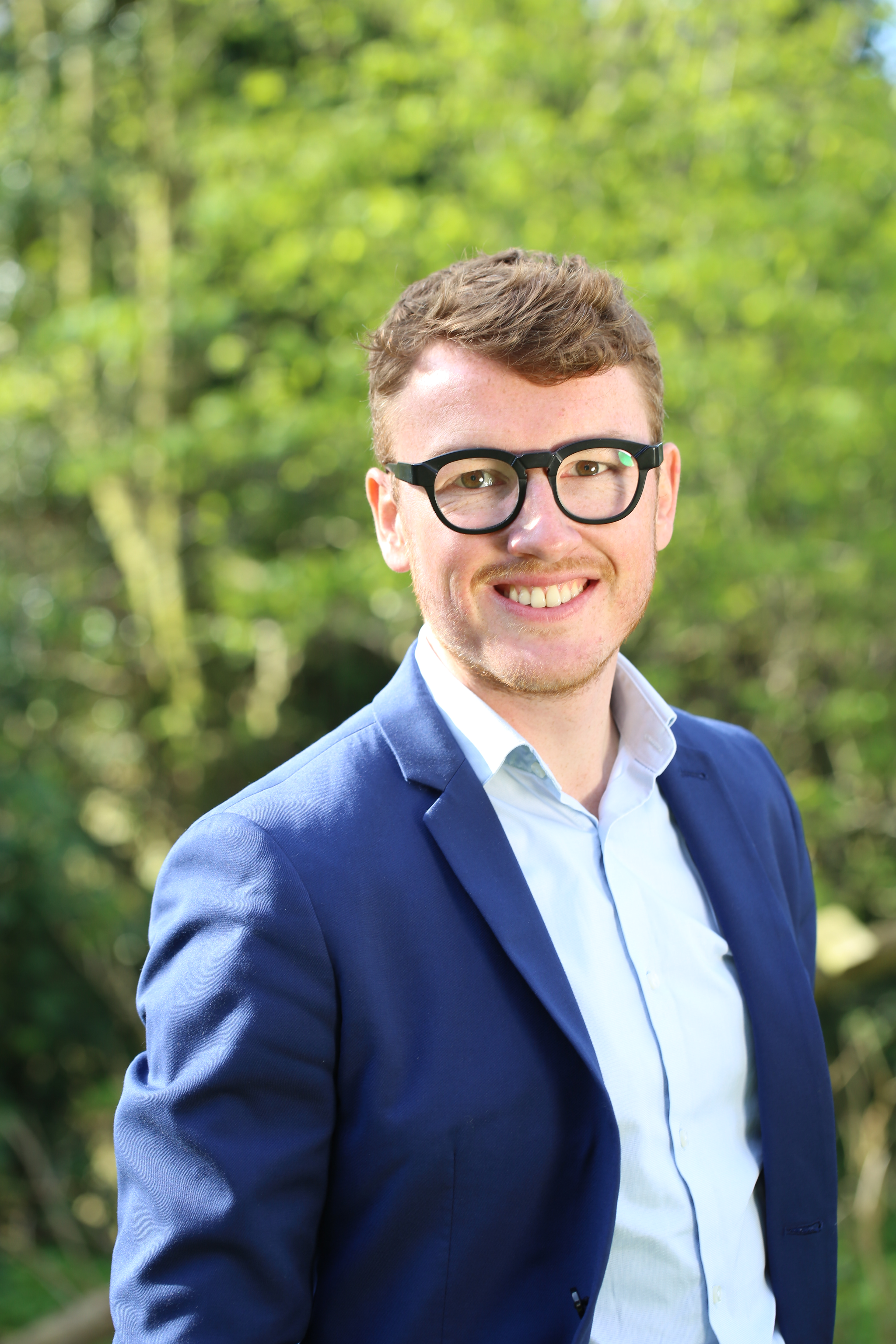 Gents schepen van Toerisme, Personeel, Werk en Sociale Economie en Openbare Netheid